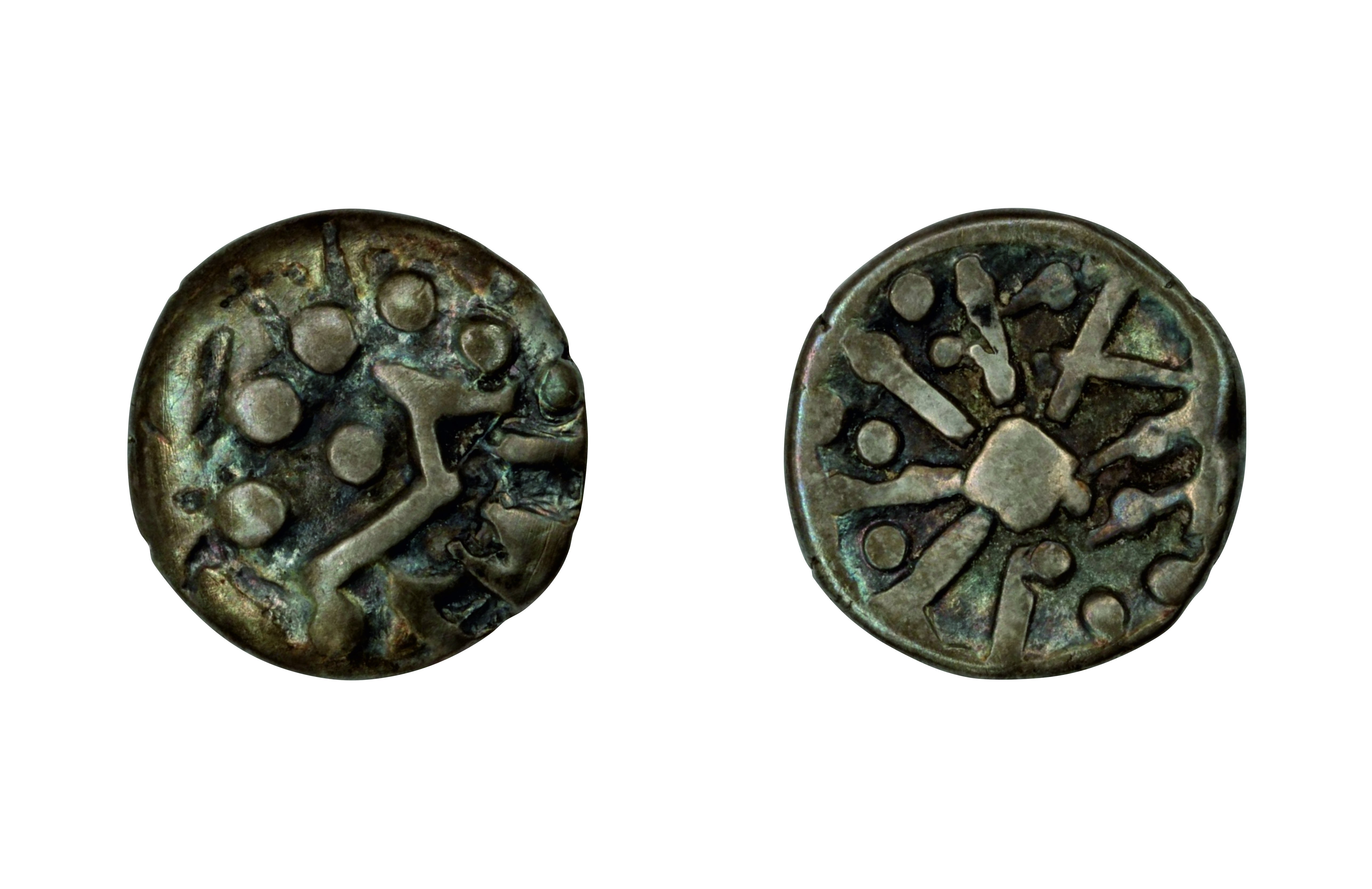 Minca typu Divinka